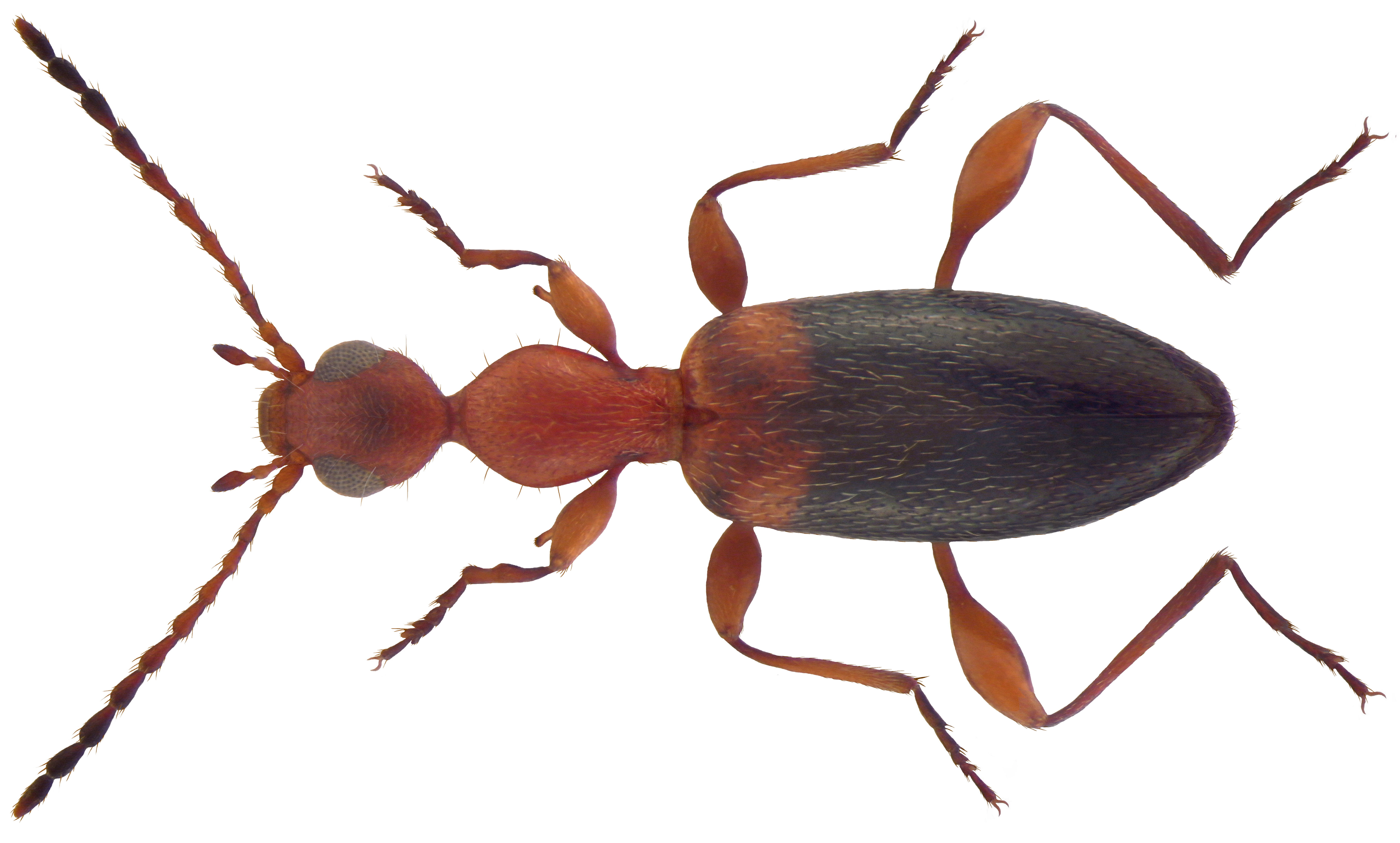 Anthelephila multiformis Kejval, 2002 Familie: Anthicidae Groesse: 4,6 mm Fundort: Dubai, Emirat Fujairah, Adgat leg. U.Schmidt, 2008; det. D.Telnov, 2009 Photo: U.Schmidt, 2010